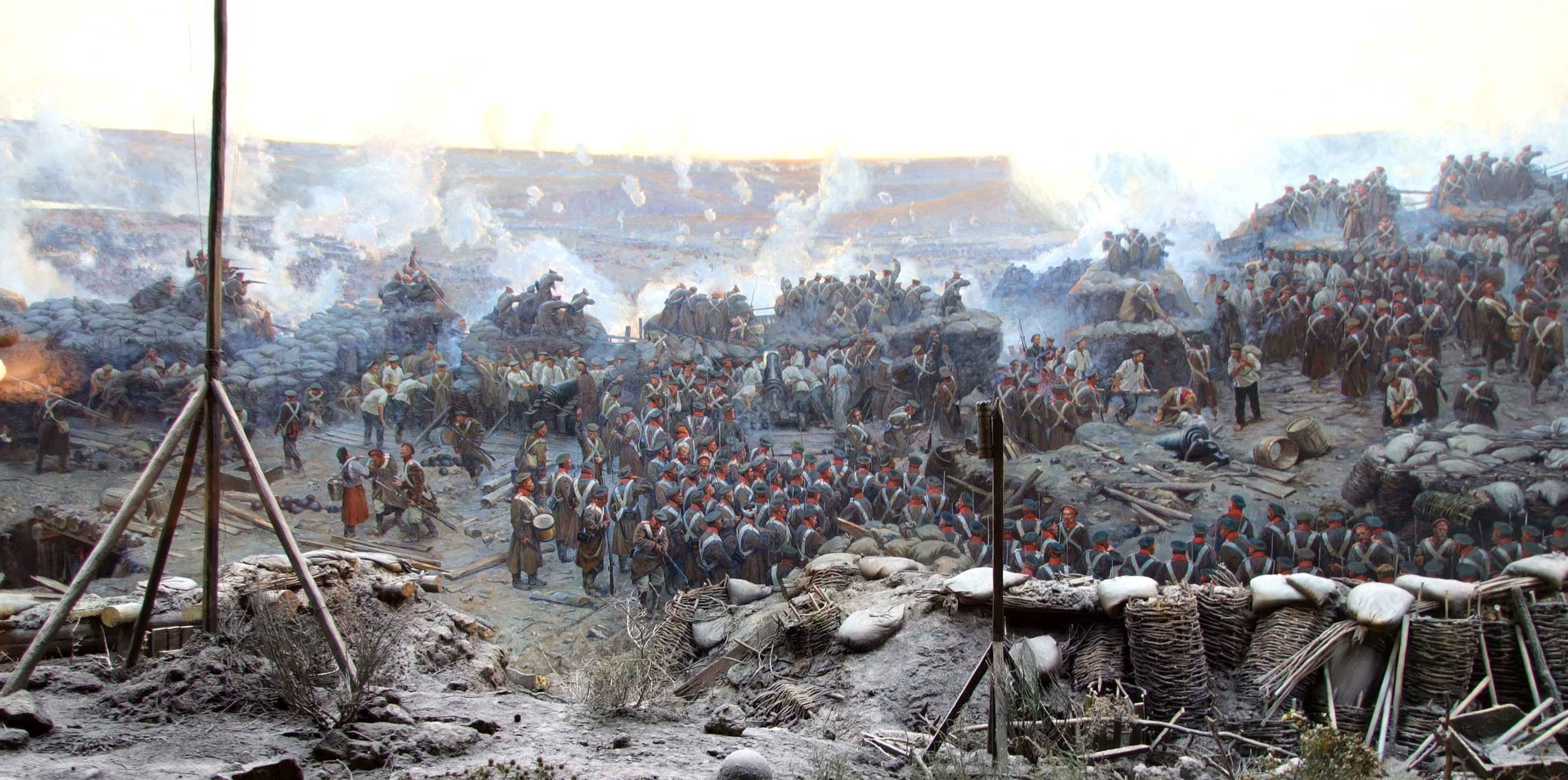 Меморіальний комплекс пам'яток оборони міста в 1854 - 1855 роках "Історичний бульвар" 1905 - 1959 роки